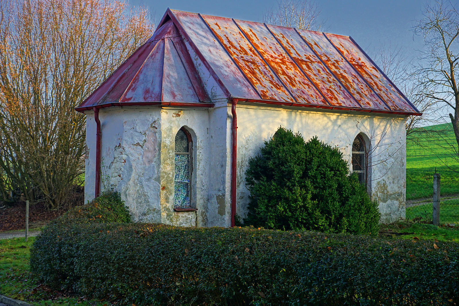 Kapelle Oberhandenzhofen